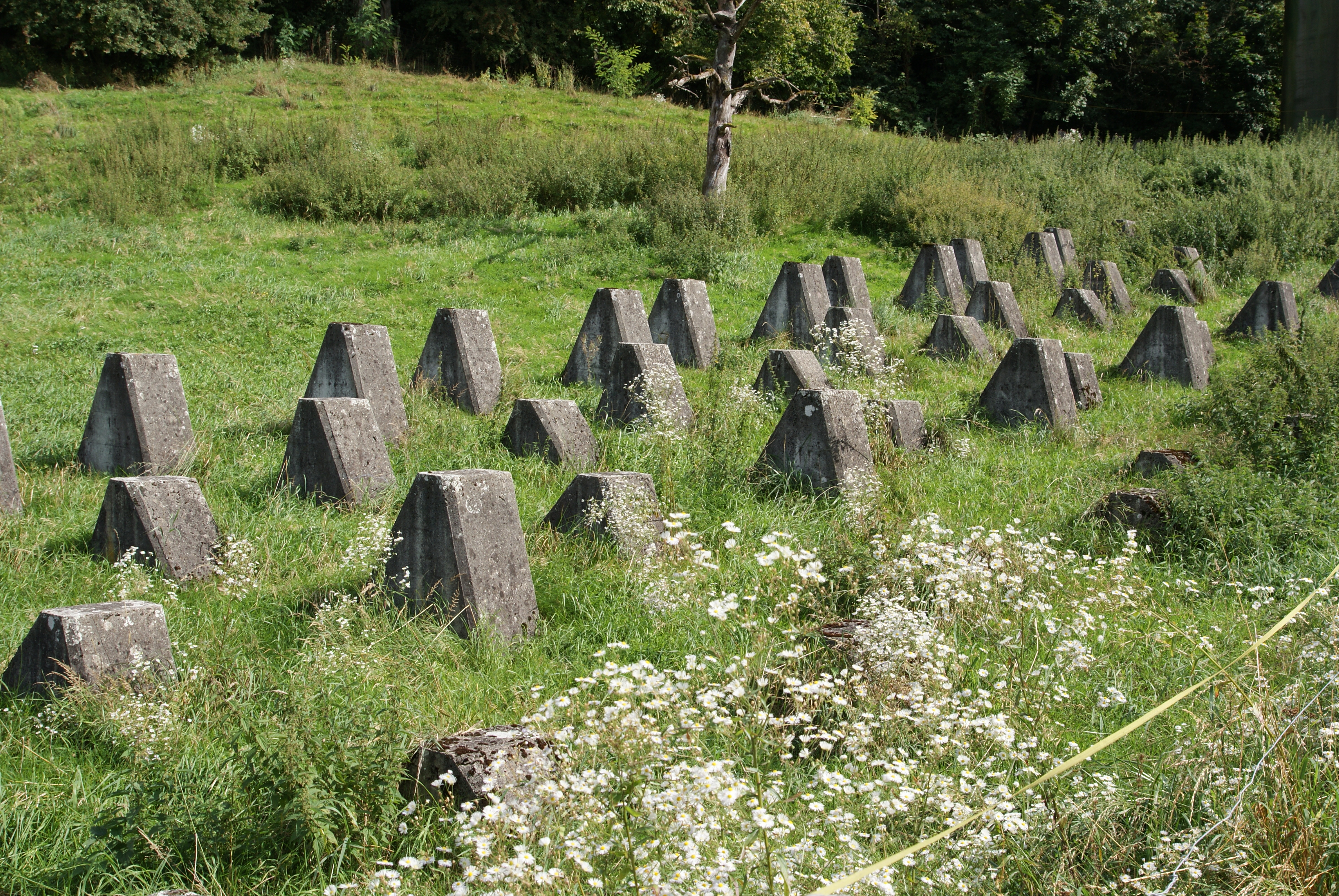 Panzersperre auf der Nordseite von Schloss Löwenberg bei Murten